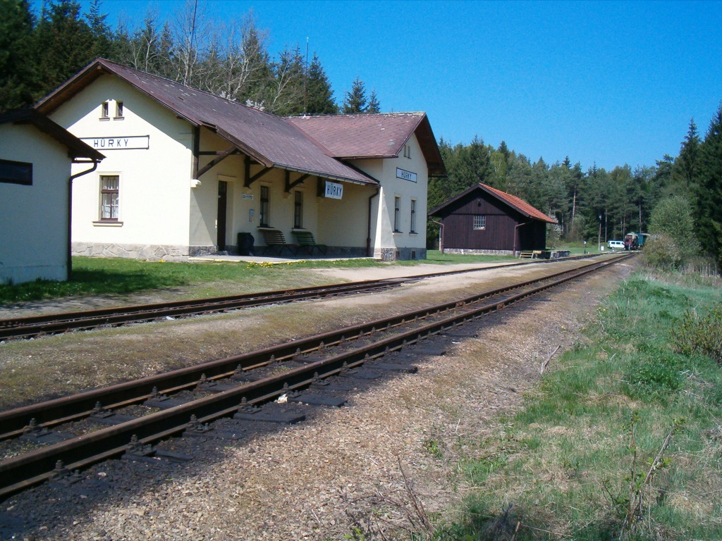 Zastávka úzkorozchodné železnice Jindřichohradecké místní dráhy v Hůrkách